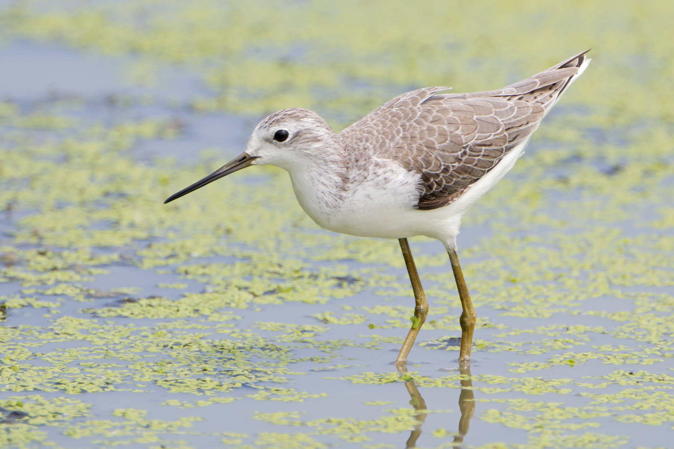 Marsh Sandpiper (Tringa stagnatilis), Laem Pak Bia, Petchaburi, Thailand